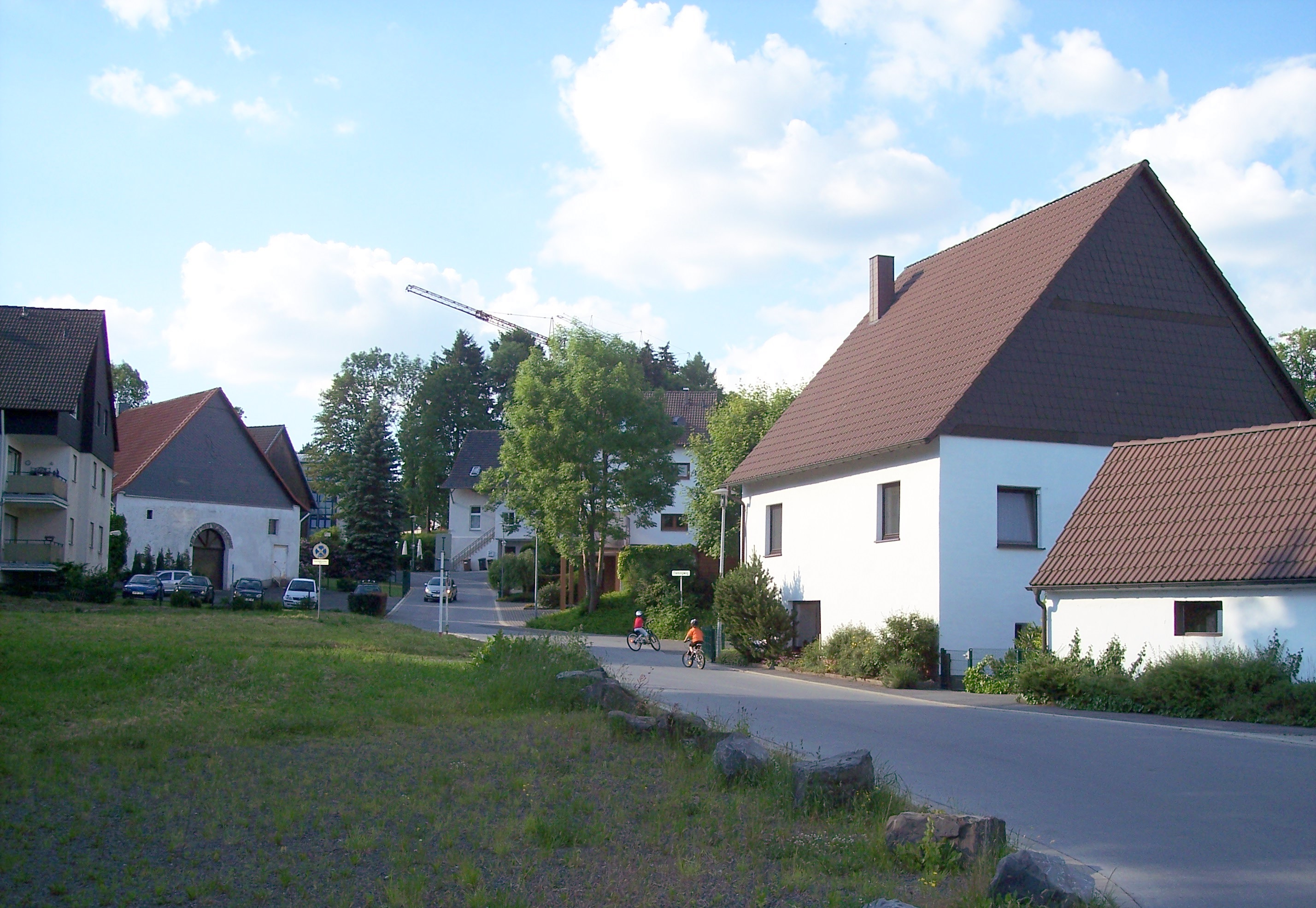 Alter Dorfkern Hellersen